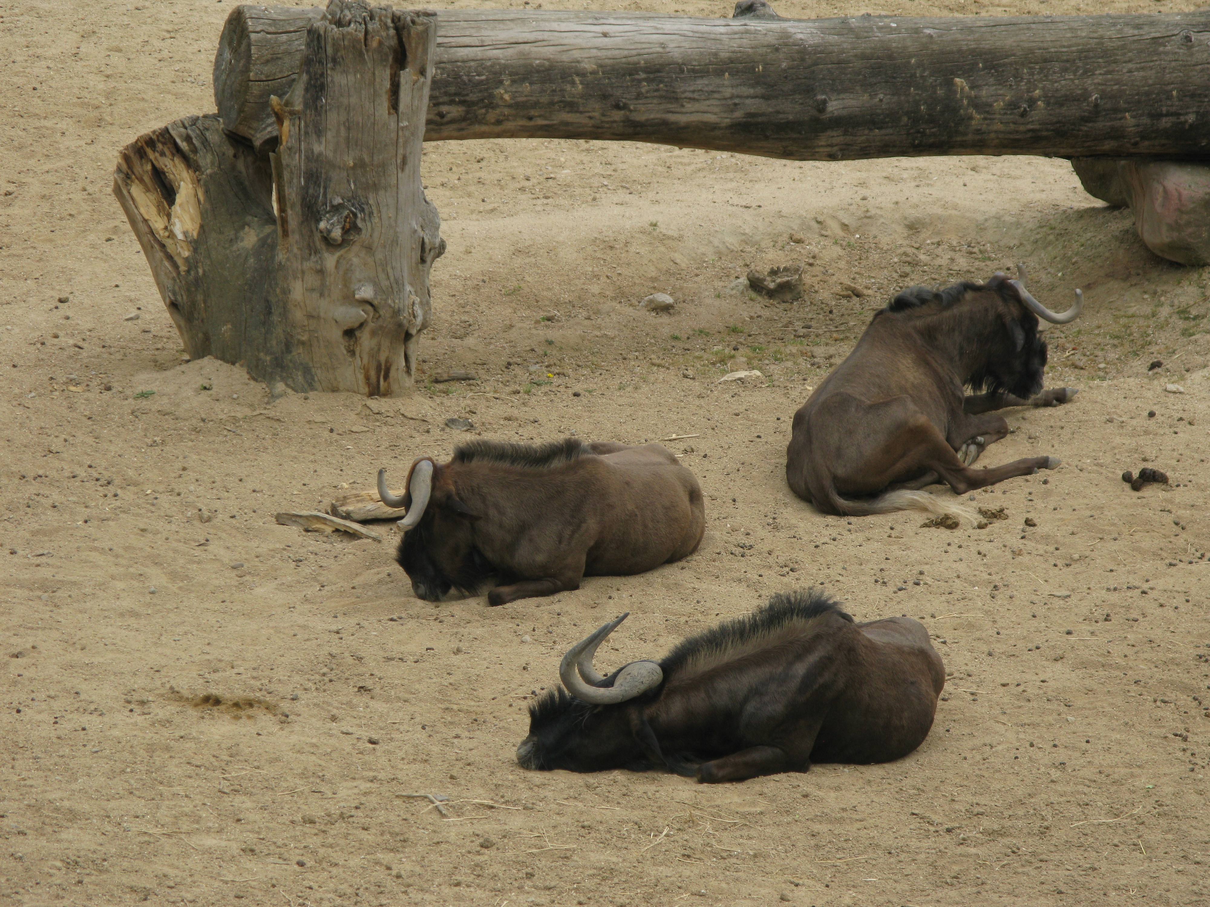 Gnous noirs (connochaetes gnou) au zoo de Madrid.